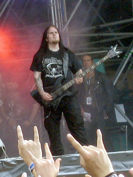 Hakon Forwald, bajista de Dissection en Wacken 2005